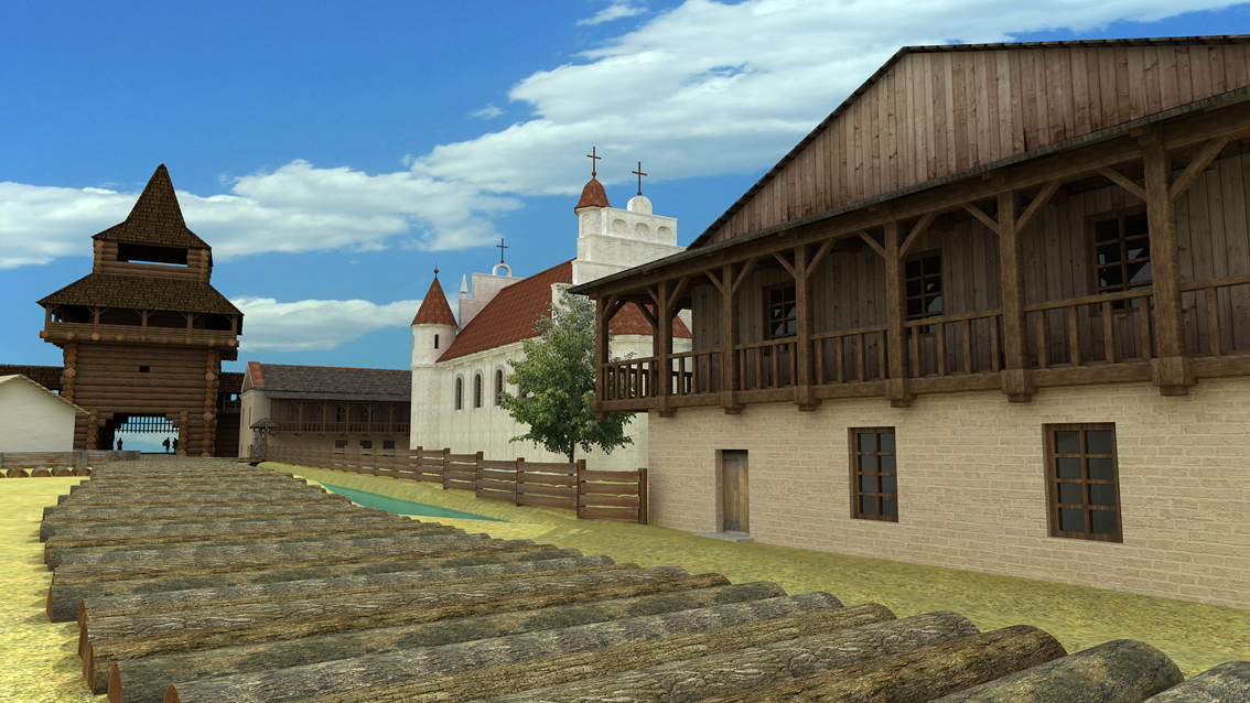 Кафедральний костел Святої Трійці, монастир шариток та Воротня вежа Окольного замку Луцька, XVI ст. Реконструкція Авраменко Д.К.